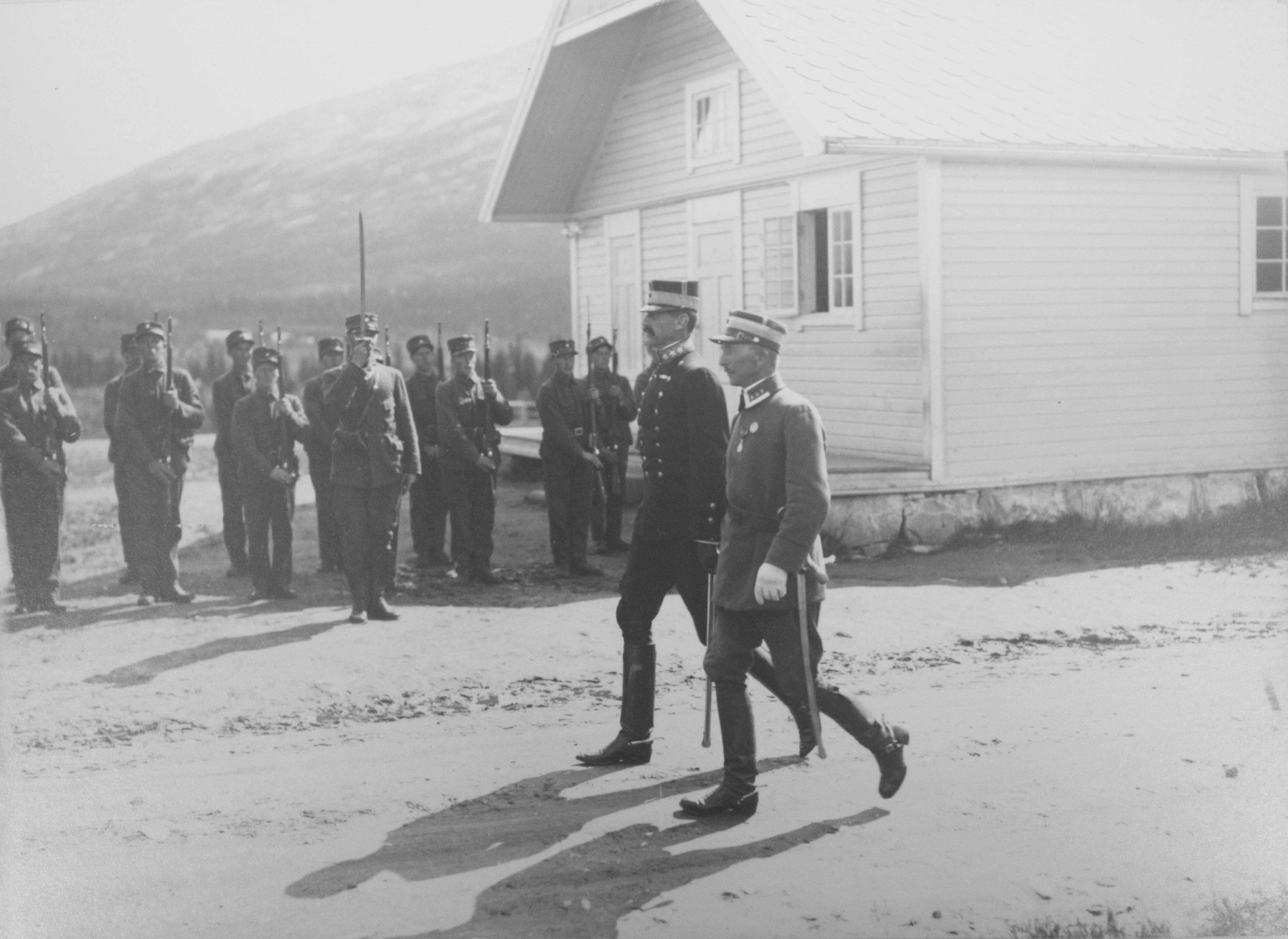 "Kong Haakon VII's ankomst til Drevja den 9. juli 1922. Oberst Falsen"